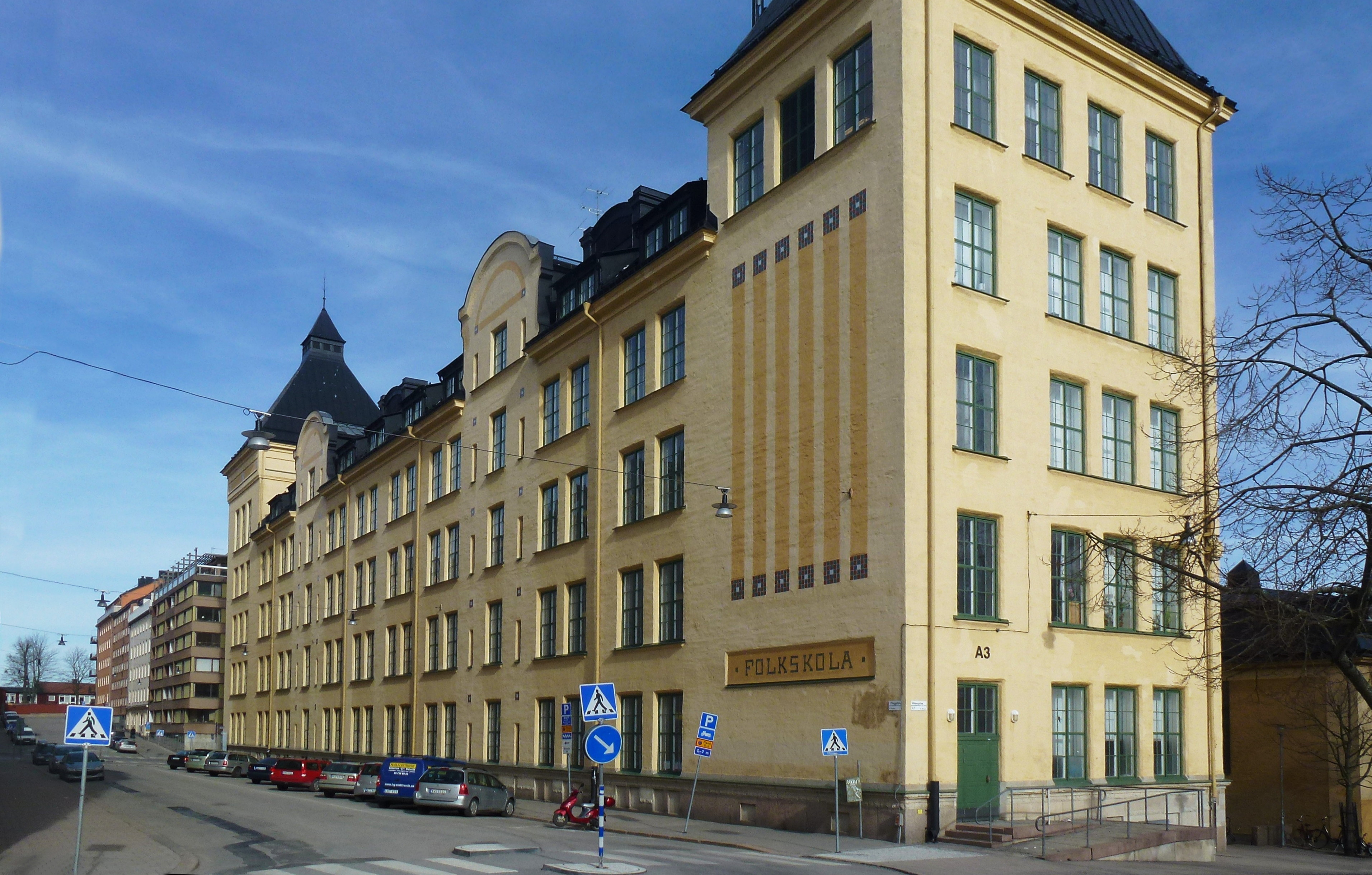 Sofia Folkskola